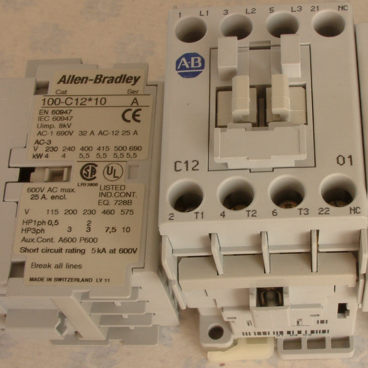 Beschriftung eines Schützen Fabrikat AB. Gebrauchskategorien AC 1 ohmsche Last (3 x 690V 32A) oder AC3 schalten von Käfigläufermotoren (bei 3 x 400V ~11A/5,5kW) ist immer direkt aufgedruckt.